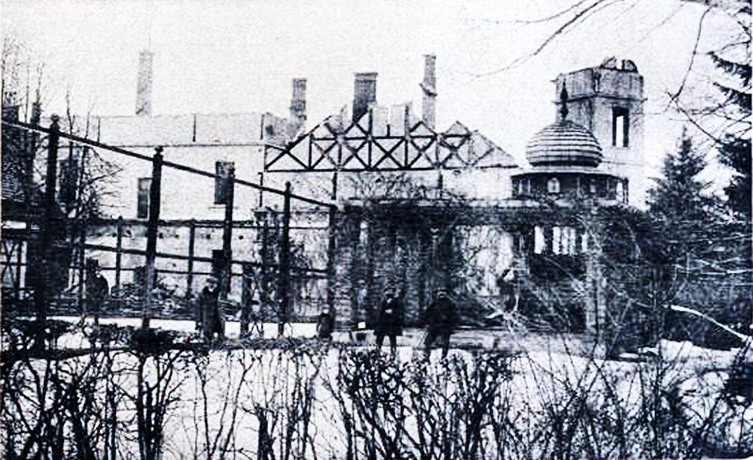 Schloss Berhometh 1915, nach dem sinnlosen Plündern und Abfackeln durch die Russen